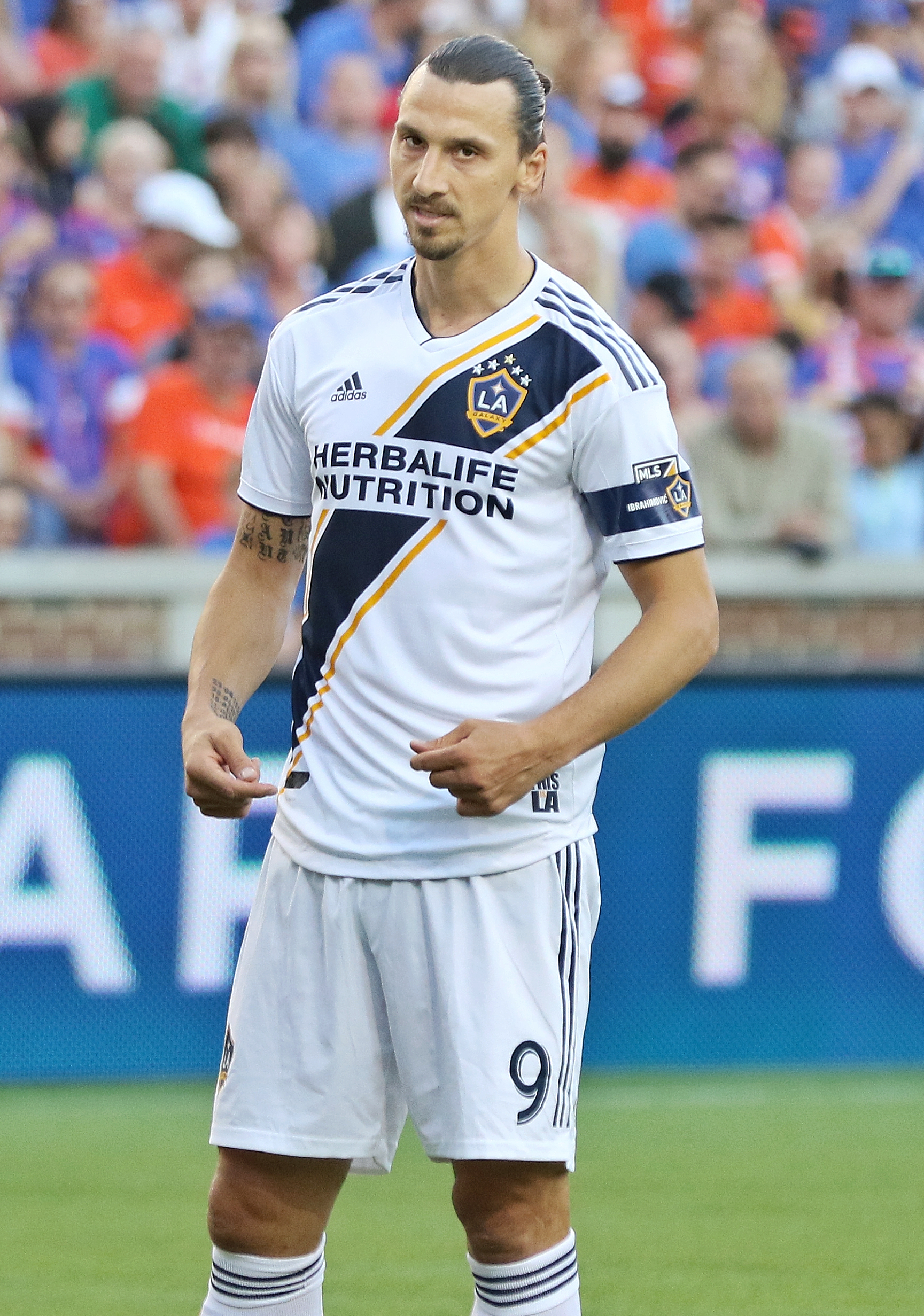 Zlatan Ibrahimović